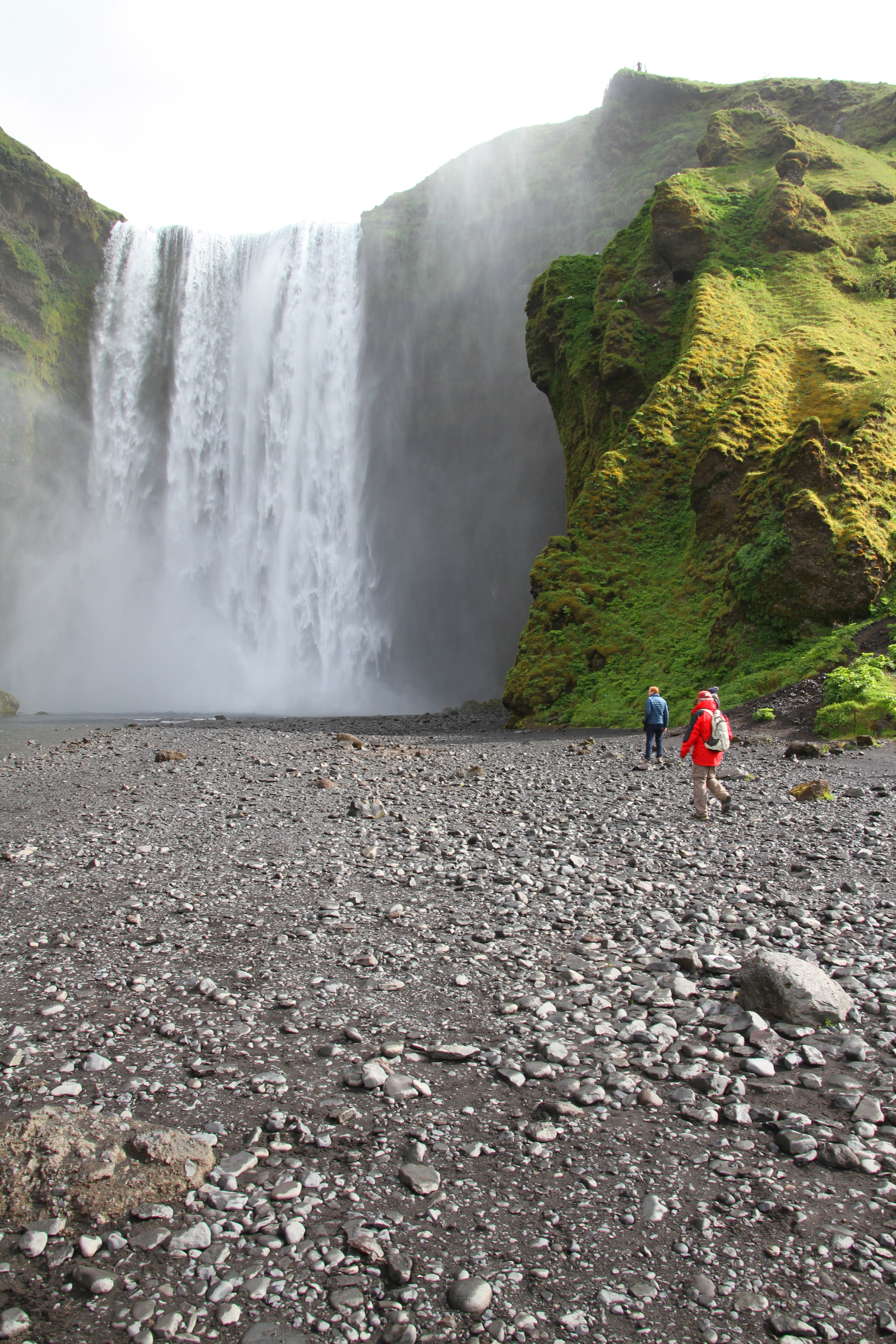 Skógafoss in 2018